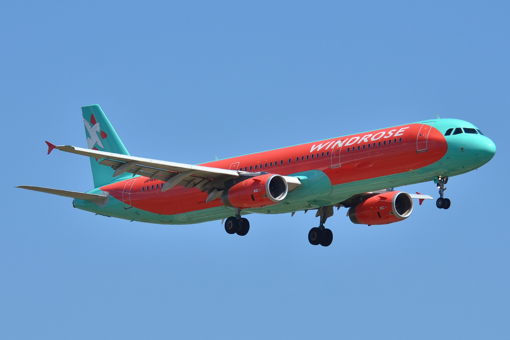 Photo prise à l'aéroport de Barcelone-El Prat (LEBL) en Espagne. Picture take at Barcelona-El Prat Airport (LEBL) in Spain.